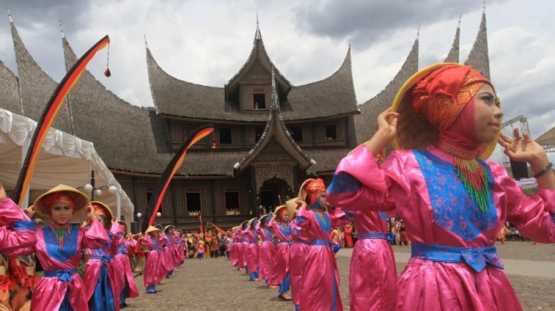 festival Budaya Minangkabau 2016